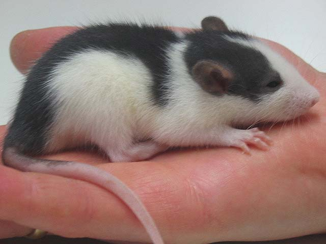 Ein frisch geborene Farbratte (3 Wochen alt)